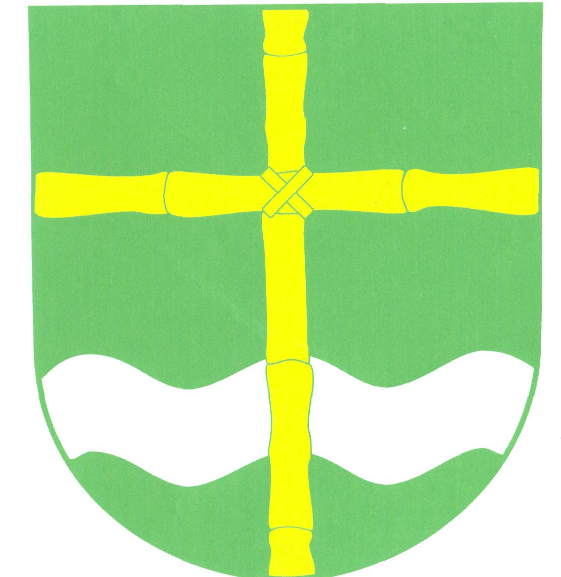 Znak obce Svatojanský Újezd